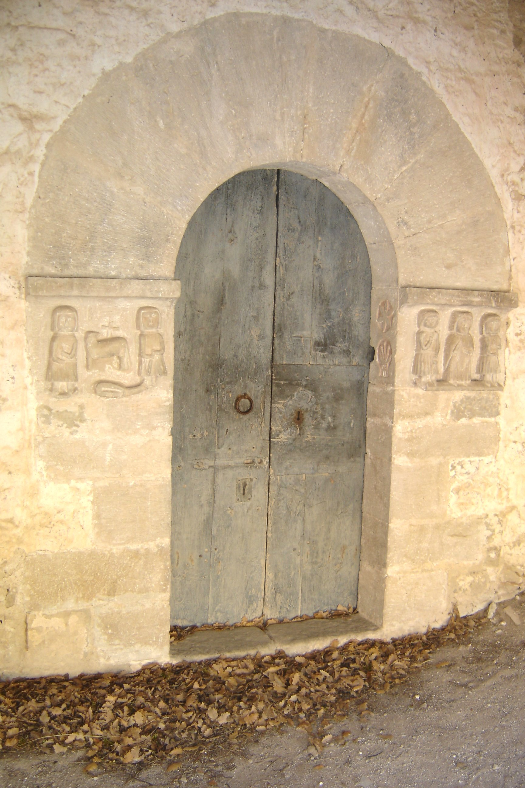 L'ermita de Sant Lleïr de Casabella, al municipi de La Coma i la Pedra, a la Vall de Lord (Solsonès). La portalada